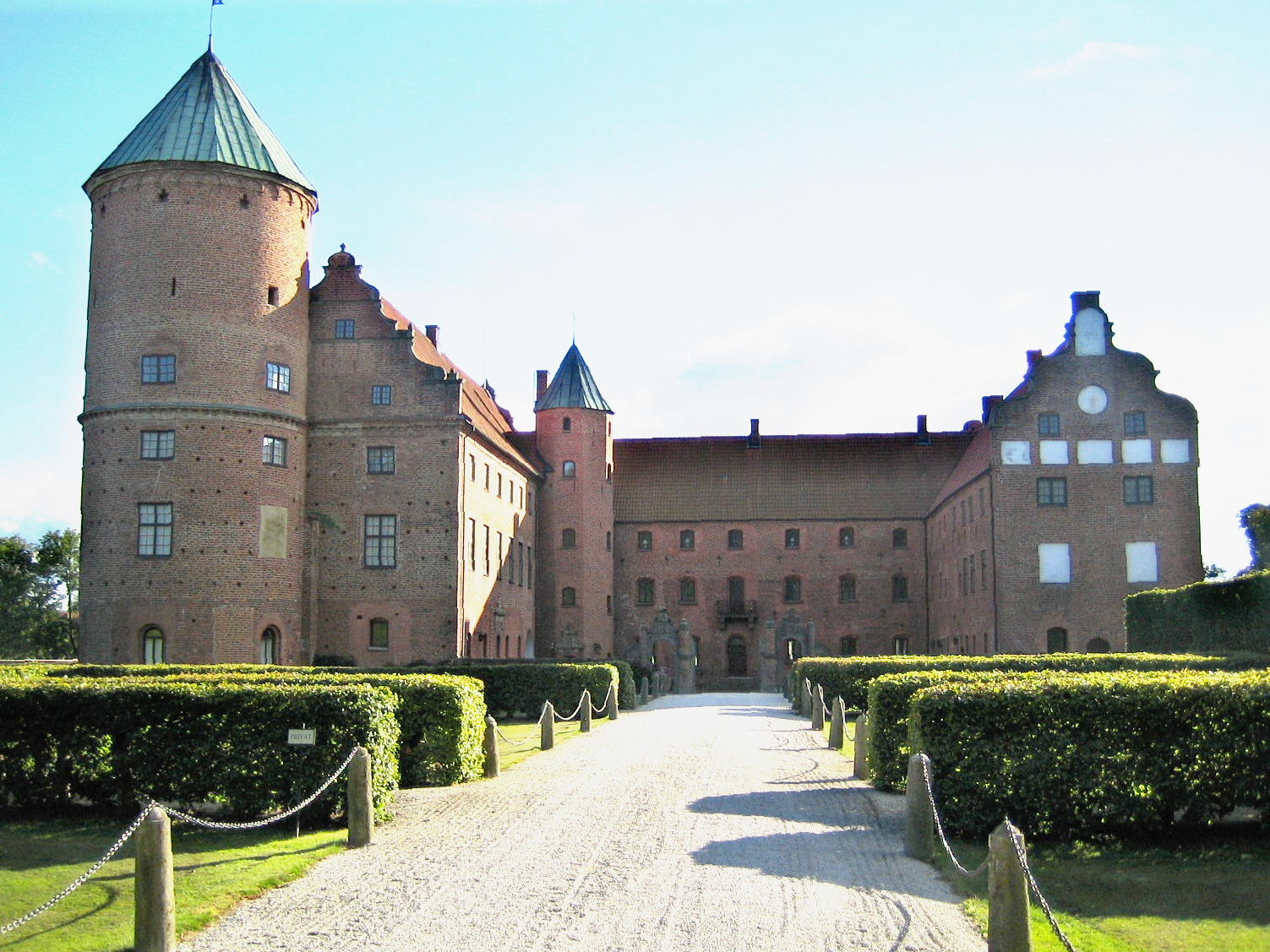 Skarhults slott. Bilden tagen av mig själv 17 september 2005.